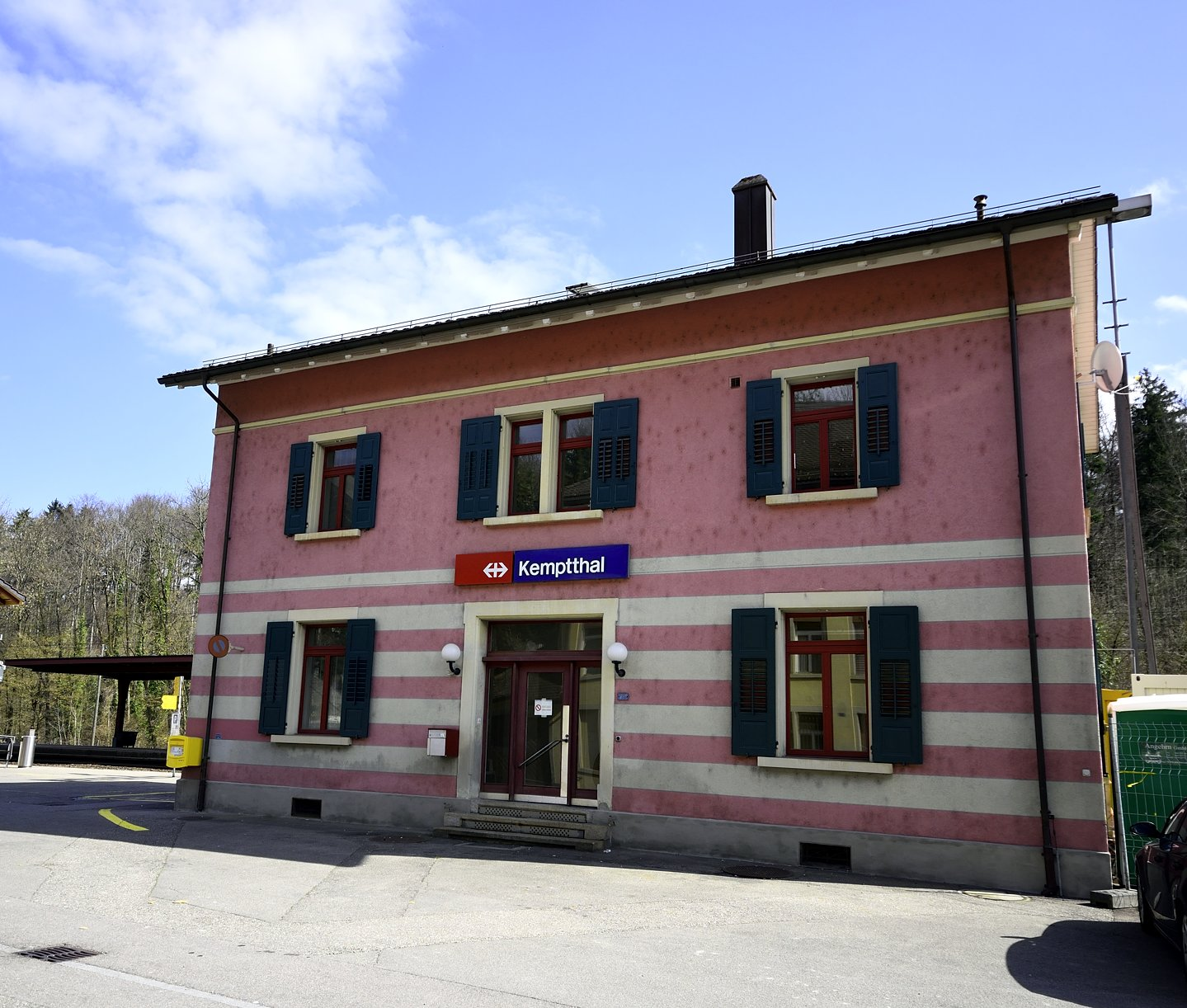 Bahnhof Kemptthal, Aufnahmegebäude, ID 17601157